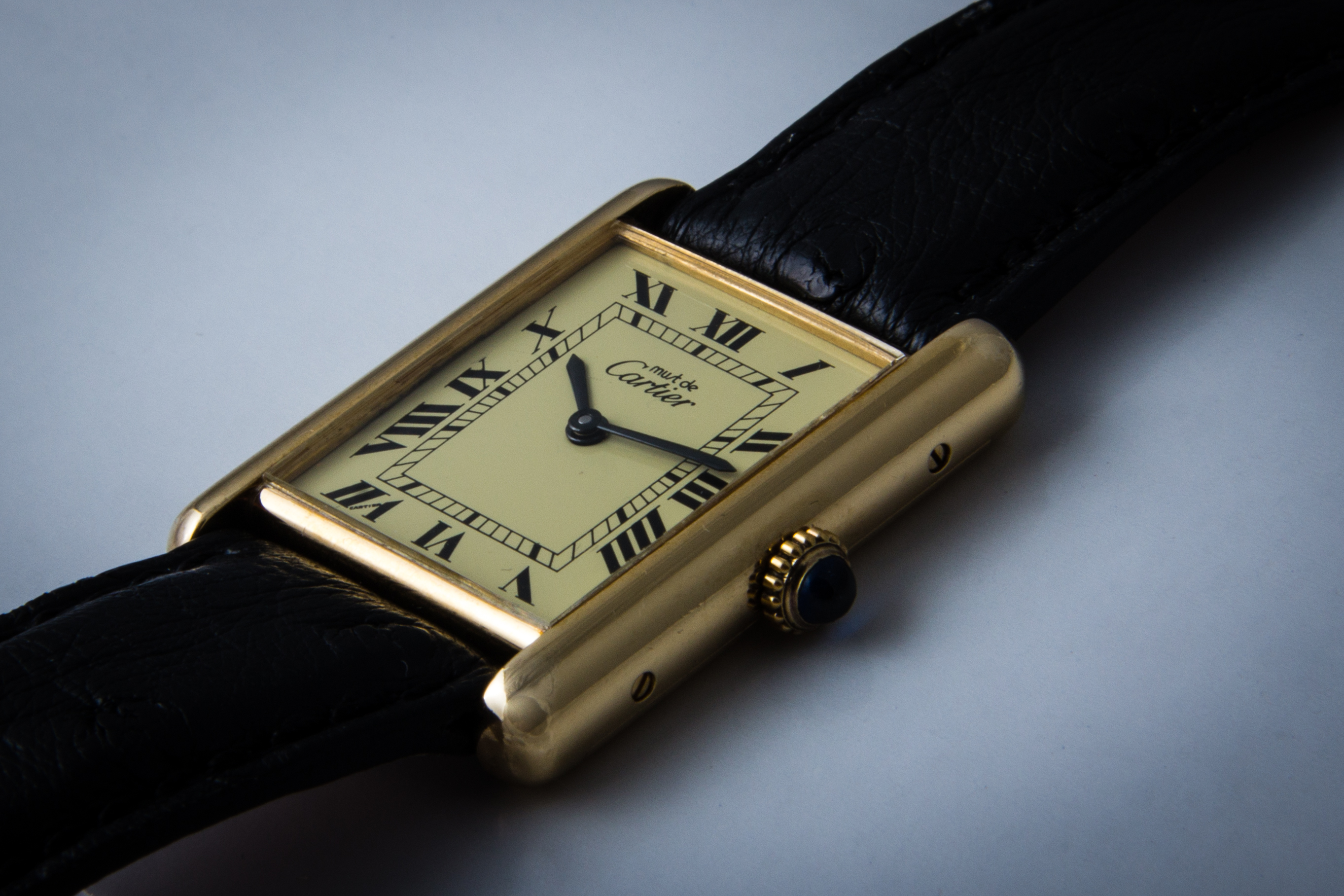 Les Must de Cartier Tank